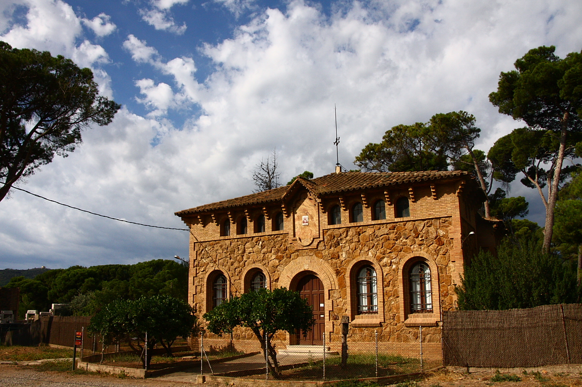 Rectoria, obra modernista de Francesc Berenguer i Bellvehí. Construïda el 1917.